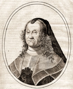 Die Landgräfin von Hessen-Kassel Amalie Elisabeth von Hanau-Münzenberg (1602-1651)